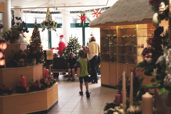 Im Lauscha gibt es ein Laden, der ganzjährig offen ist. Hier wird Weihnachtsschmuck verkauft. Das Bild hier ist aufgenommen im Juli 1999, als wir uns auf Durchreise befanden und ganz überrascht waren soetwas zu sehen.